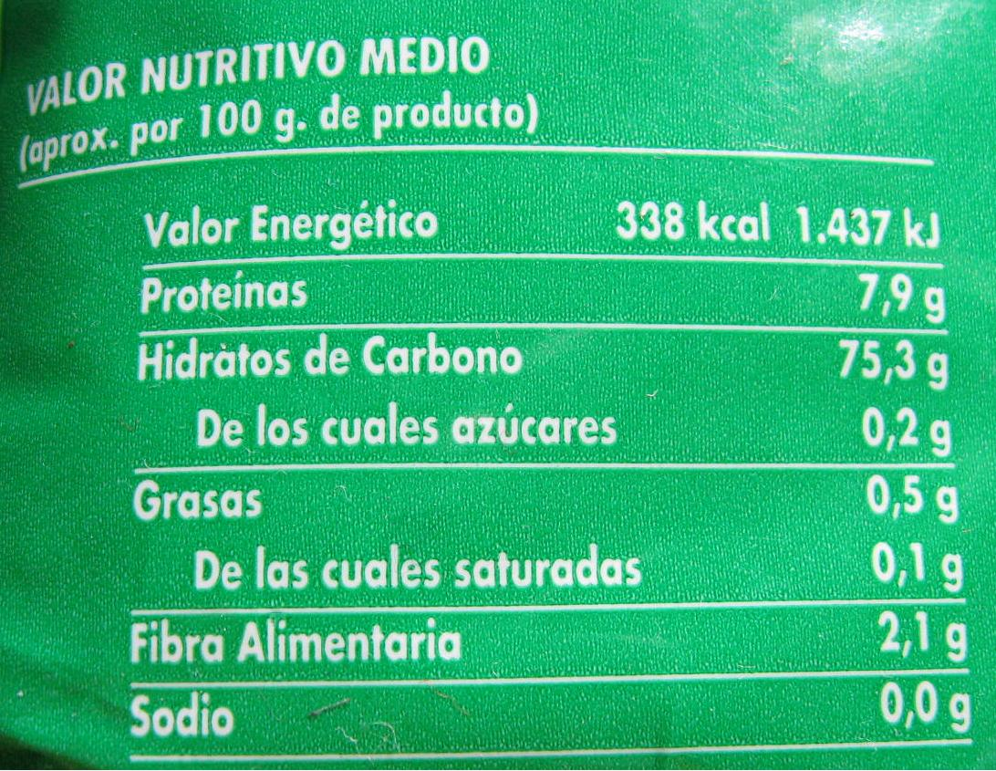 Etiqueta nutricional de un alimento envasado.